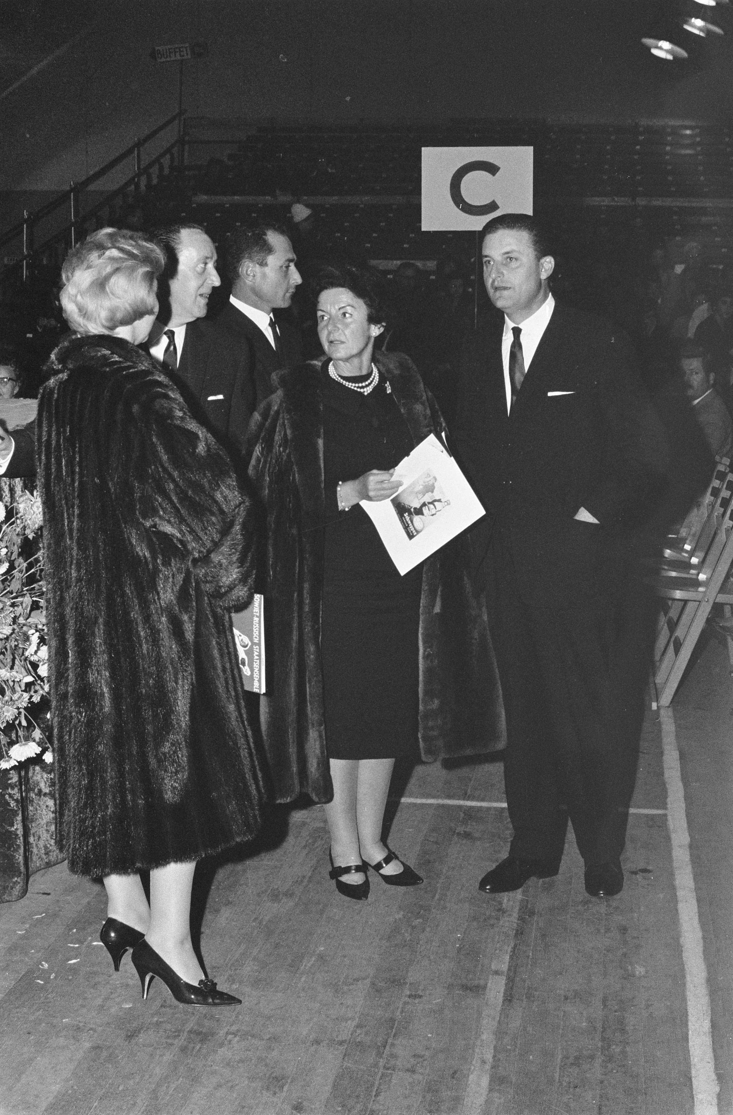 Collectie / Archief : Fotocollectie Anefo Reportage / Serie : [ onbekend ] Beschrijving : Opdracht Telegraaf, Marie Antoinette van monaco Datum : 2 november 1962 Locatie : Monaco Trefwoorden : opdrachten Persoonsnaam : Marie Antoinette Instellingsnaam : Telegraaf Fotograaf : Gelderen, Hugo van / Anefo Auteursrechthebbende : Nationaal Archief Materiaalsoort : Negatief (zwart/wit) Nummer archiefinventaris : bekijk toegang 2.24.01.05 Bestanddeelnummer : 914-4729